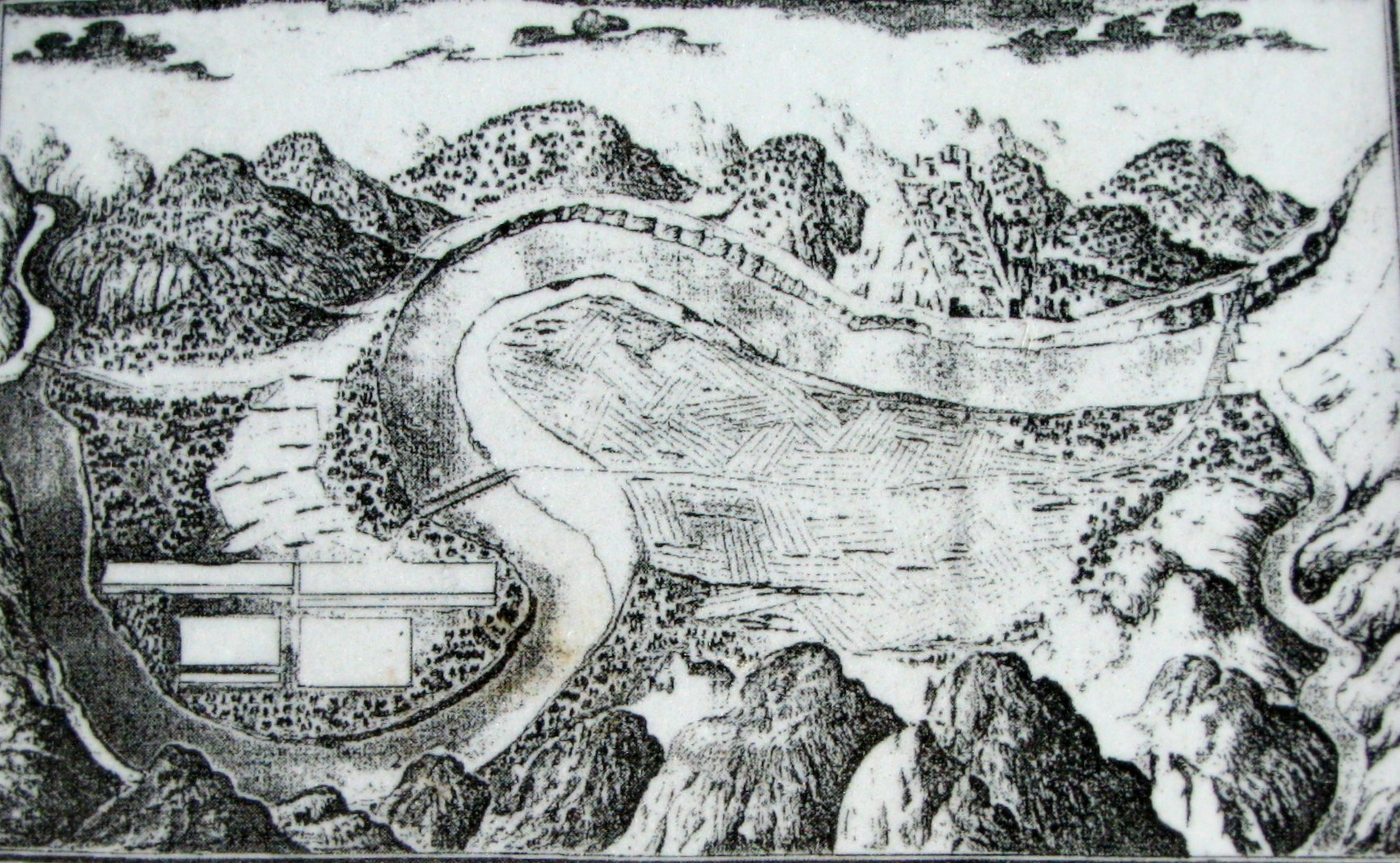 Аустријска гравура Добојске тврђаве и околине града из 1697. године, настала при походу војске Еугена Савојског.